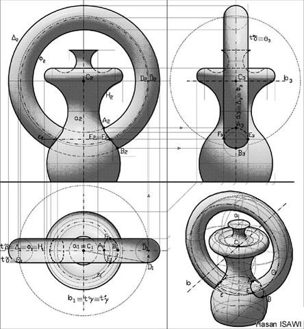 casi d`intersezione tra superfici di rotazione. Link